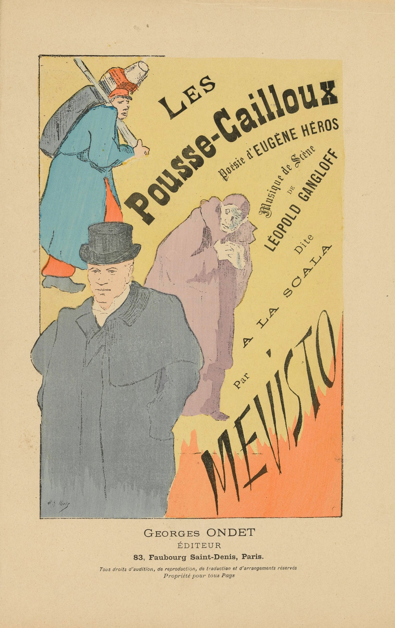 Les Pousse Cailloux feuille de partition, 1893, 27.5 cm x 17.7 cm, dessin par Henri Gabriel Ibels (1867-1936) Van Gogh Museum, Amsterdam (Vincent van Gogh Foundation)